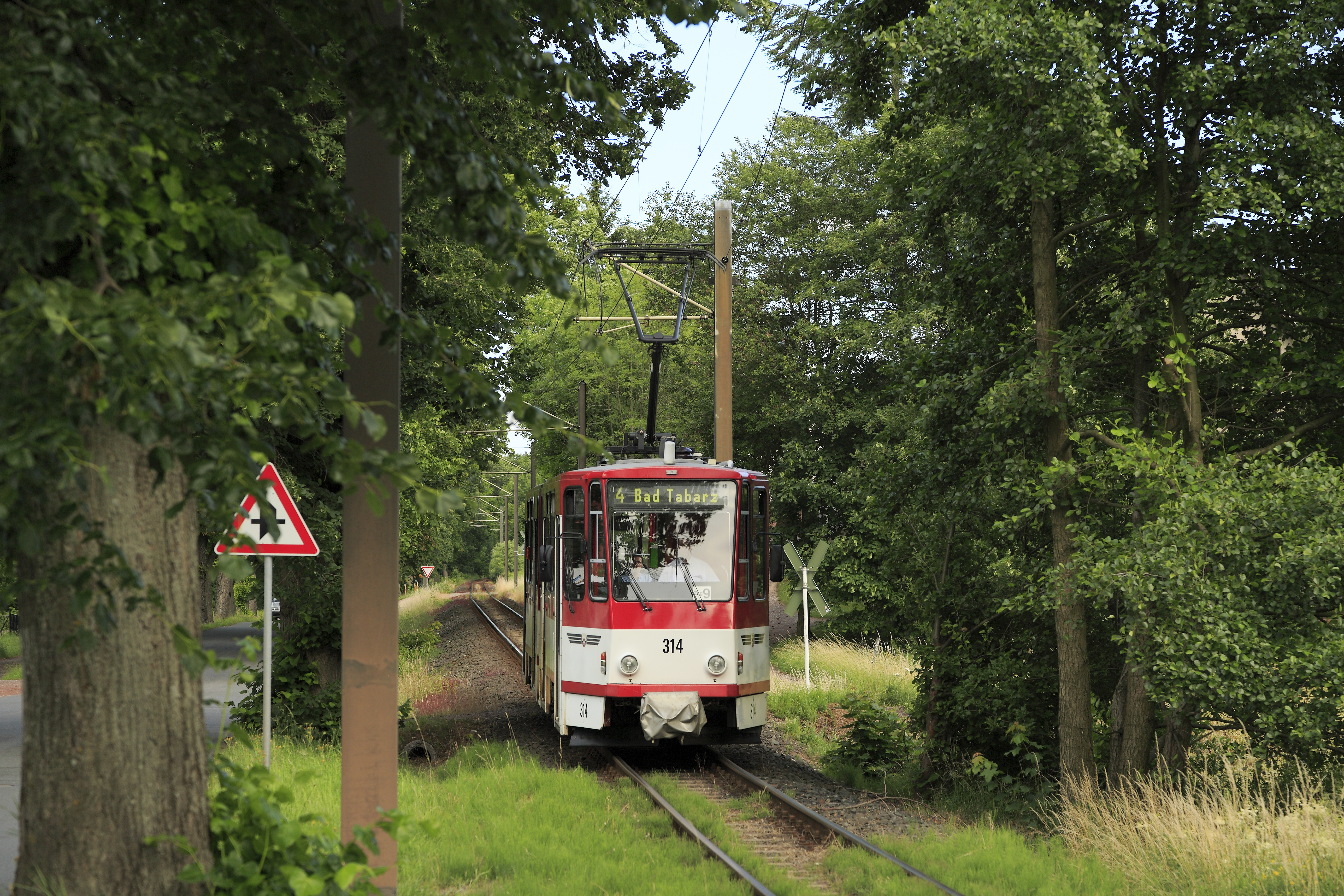 Zug der Linie 4 bei der Einfahrt von Gotha, der Triebwagen mit Segmentanzeige schildert schon »Bad Tabarz«. Der Name gilt erst seit dem 10. März 2017.